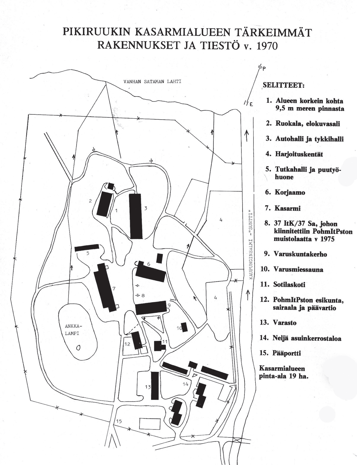 Pikiruukin kasarmialueen tärkeimmät rakennukset ja tiestö v. 1970.